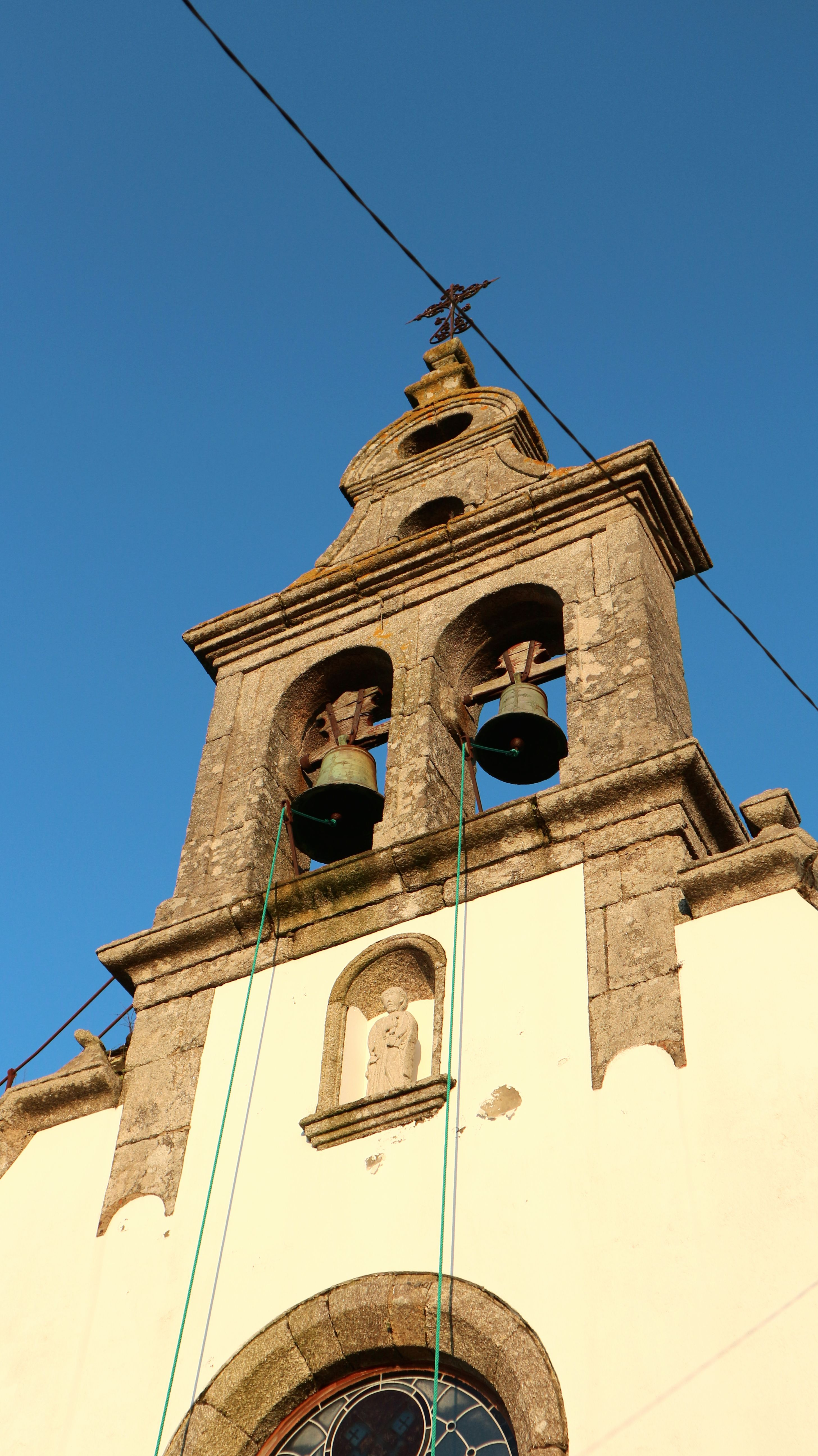 Igrexa de San Pedro de Porzomillos. Porzomillos, Oza-Cesuras.